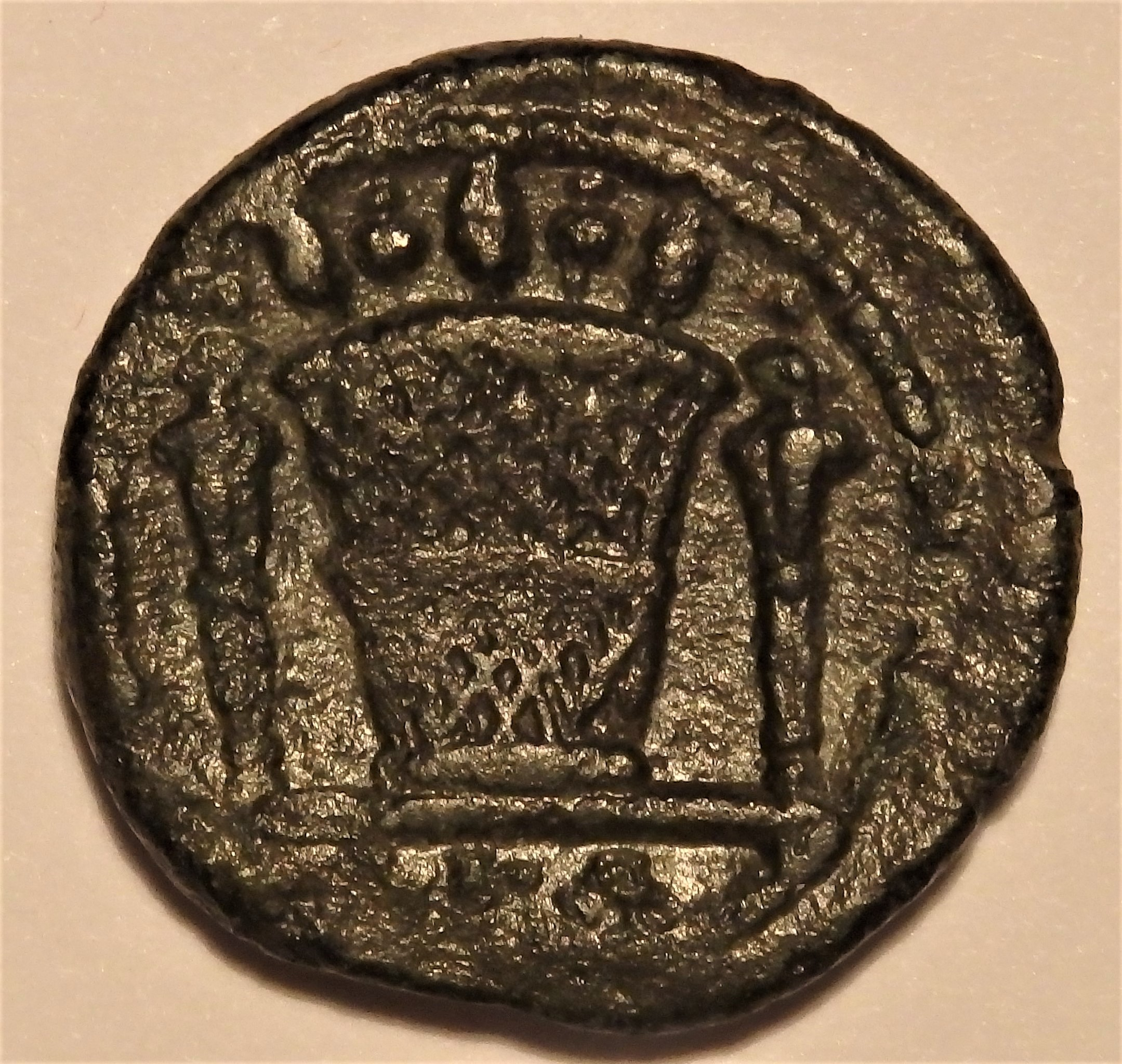 Kalathos auf Bronzemünze aus Alexandria z.Zt. Hadrians, Kampmann/Ganschow 32.762